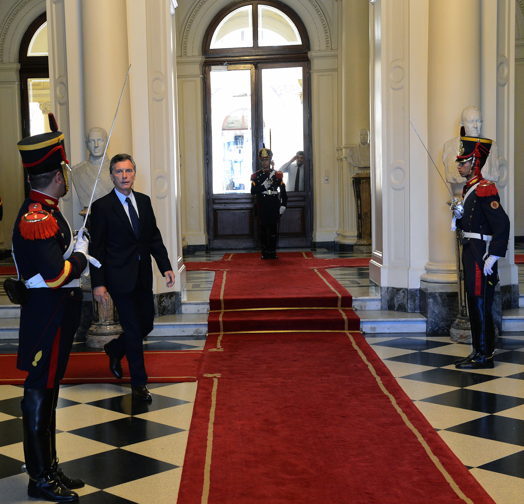 Mauricio Macri ingresa a trabajar a la Casa Rosada por primera vez el 11 de diciembre de 2015.